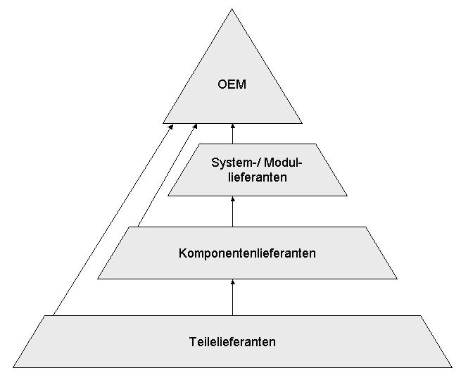 Systematische Darstellung der Lieferantenpyramide.